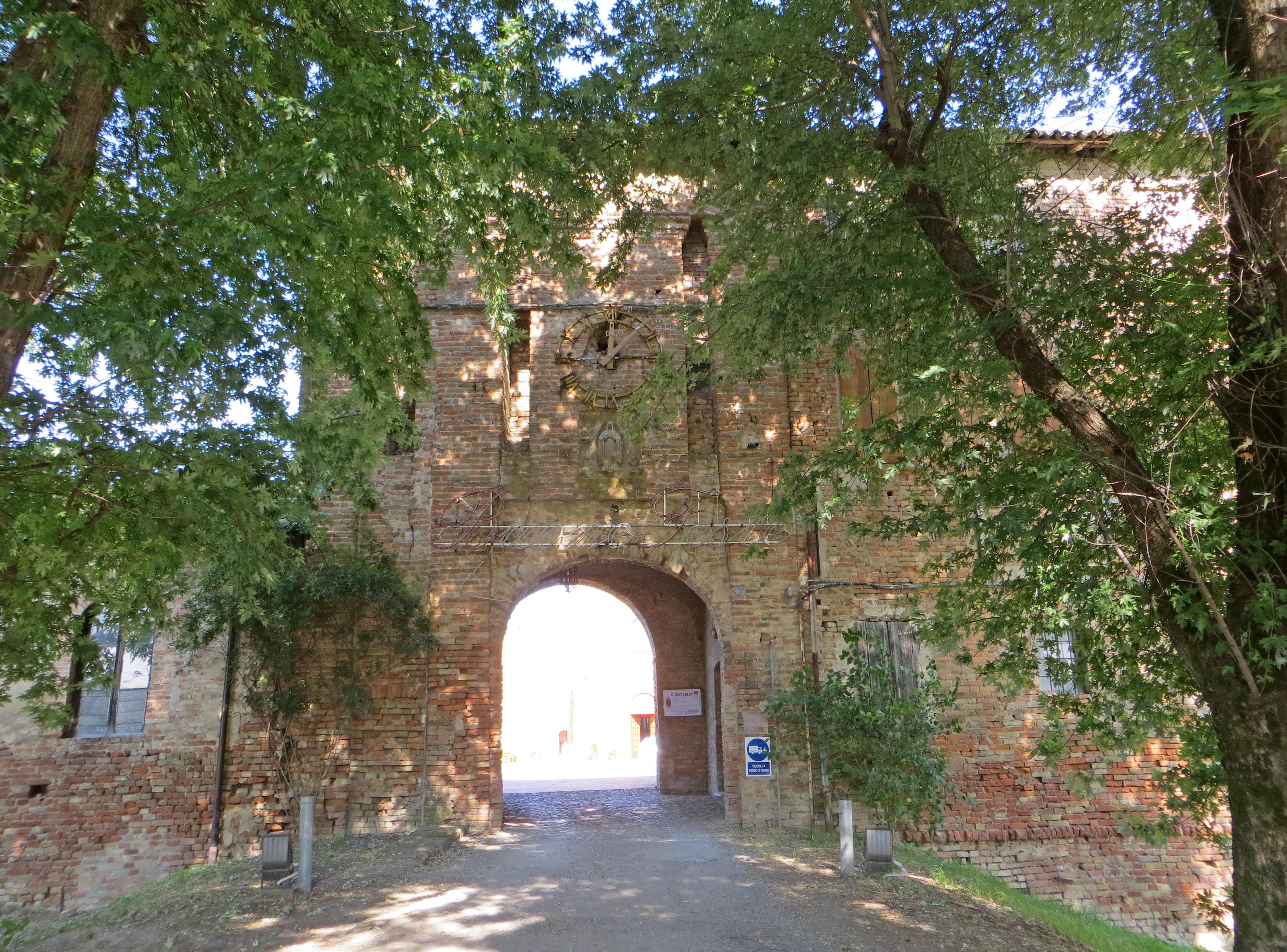 Monastero di Santa Maria Assunta (Castione Marchesi, Fidenza) - lato esterno del rivellino d'ingresso